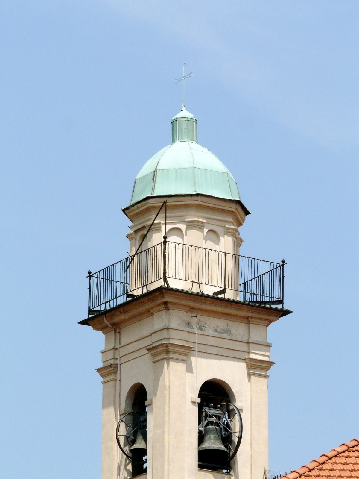 Chiesa di Santa Caterina, Rossiglione, Liguria, Italia